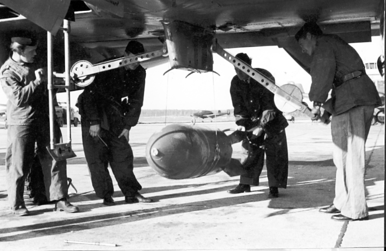 600 kg minbomb m/50 som hängs upp på en A 21A-3.